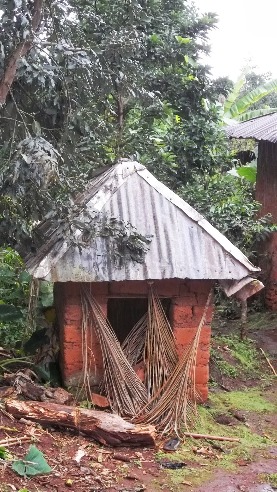 Un lieu sacré dans le Groupement Bamougong